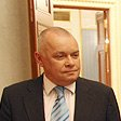 Дмитрий Киселёв в декабре 2008 года, на интервью Президента России ведущим телеканалам